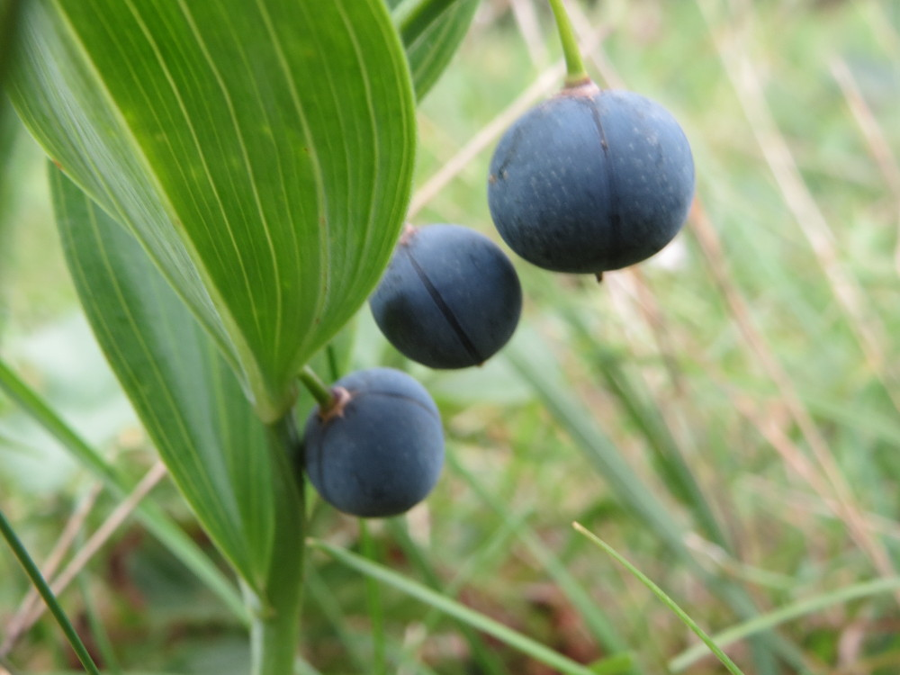 Salomonssiegel (Polygonatum odoratum) auf dem Feldherrenhügel (Oftersheimer Dünen)